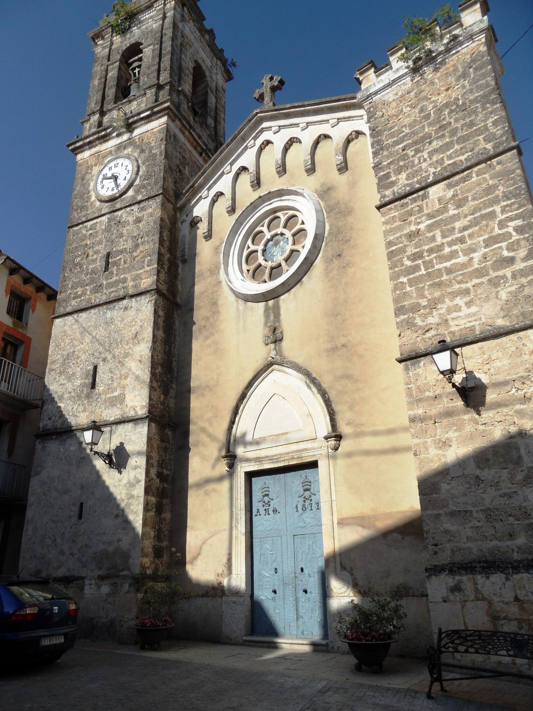 Església de la Transfiguració del Senyor d'Alfafara.